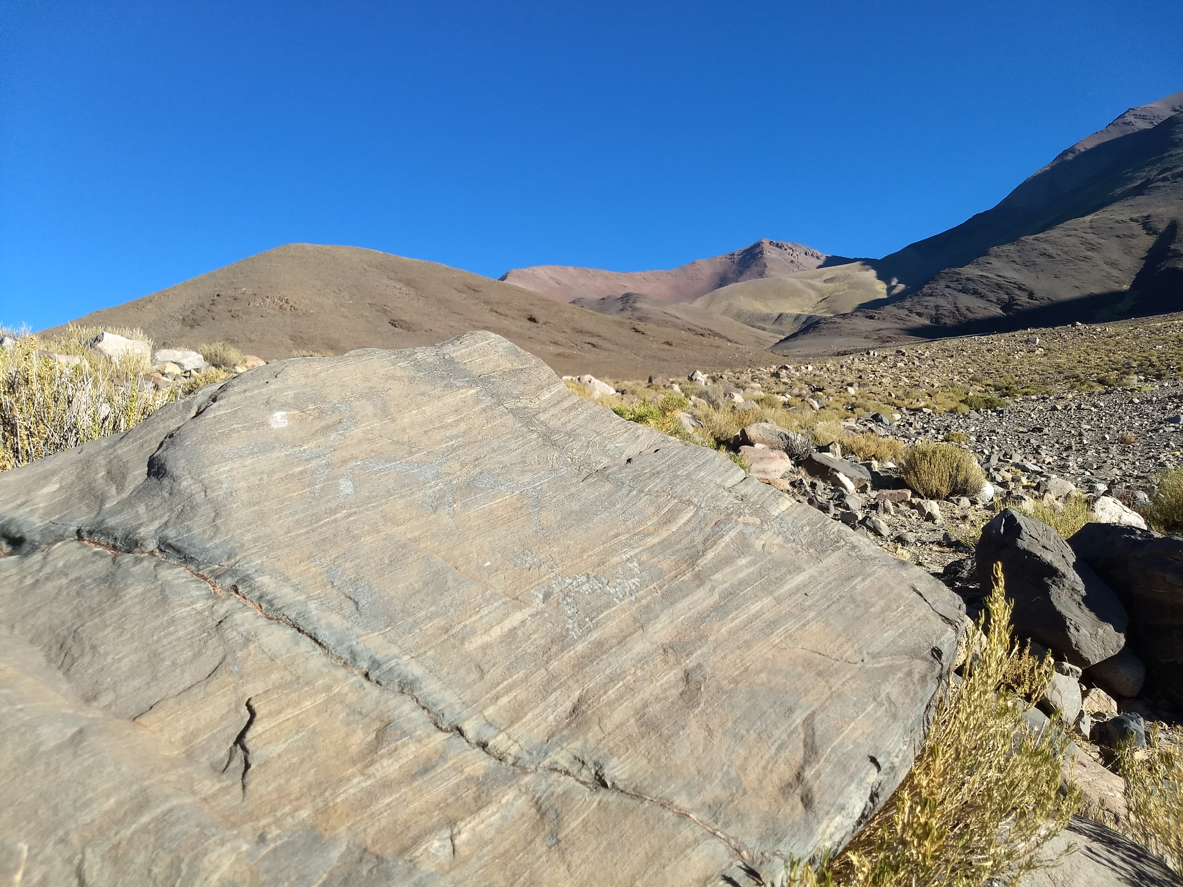 natural. lugares